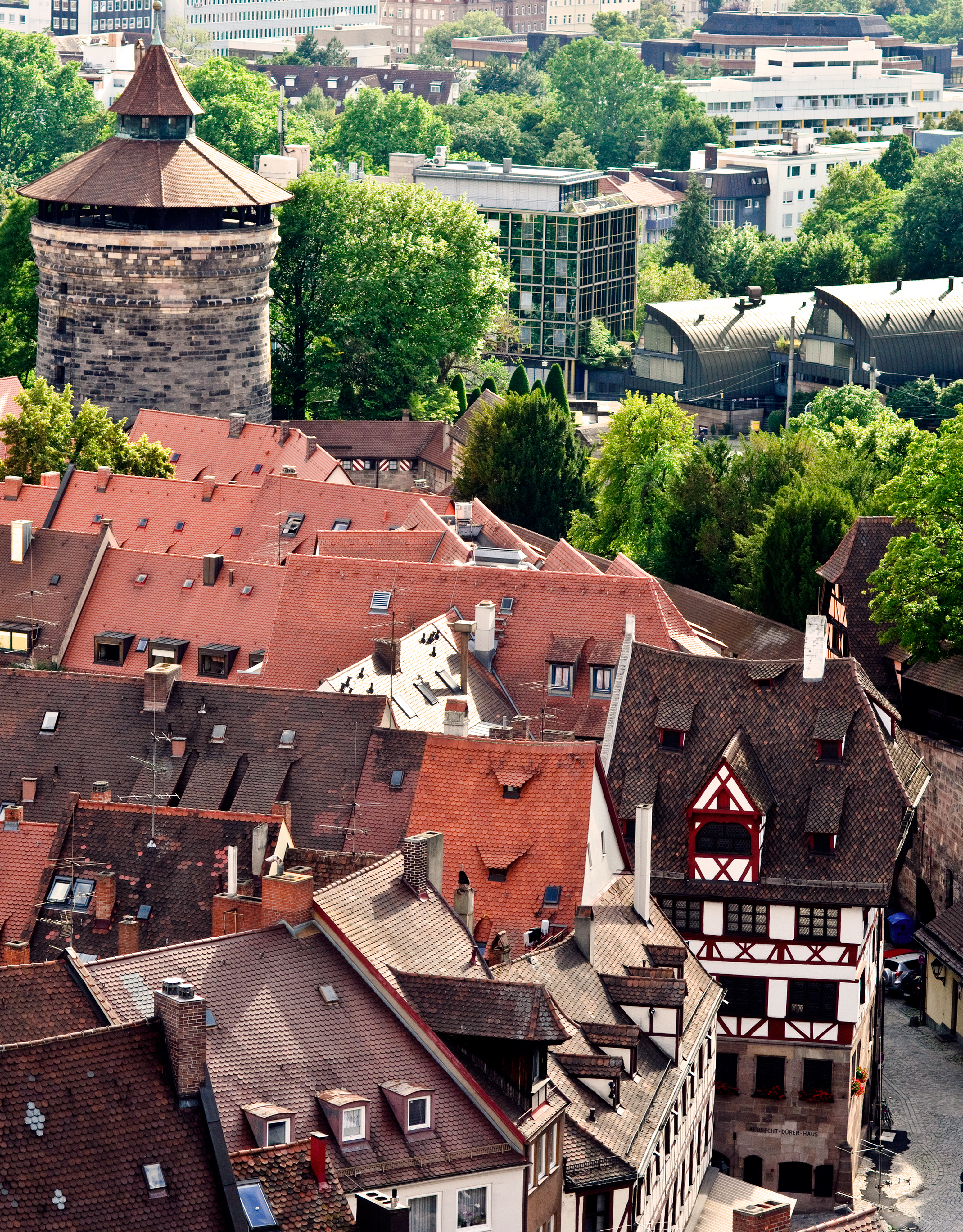 Albrecht Dürer Haus Nürnberg